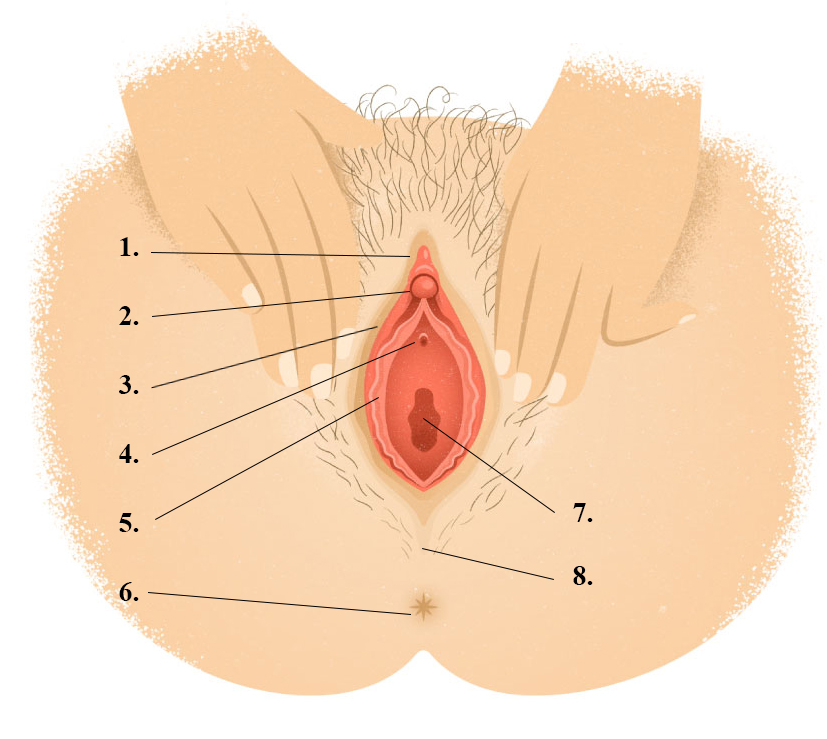 En vulva med kjønnsleppene adskilt. 1: Klitorishetten 2: Klitoris 3: Ytre kjønnslepper 4: Uretra 5: Indre kjønnslepper 6: Anus 7: Vaginalåpningen 8: Perineum